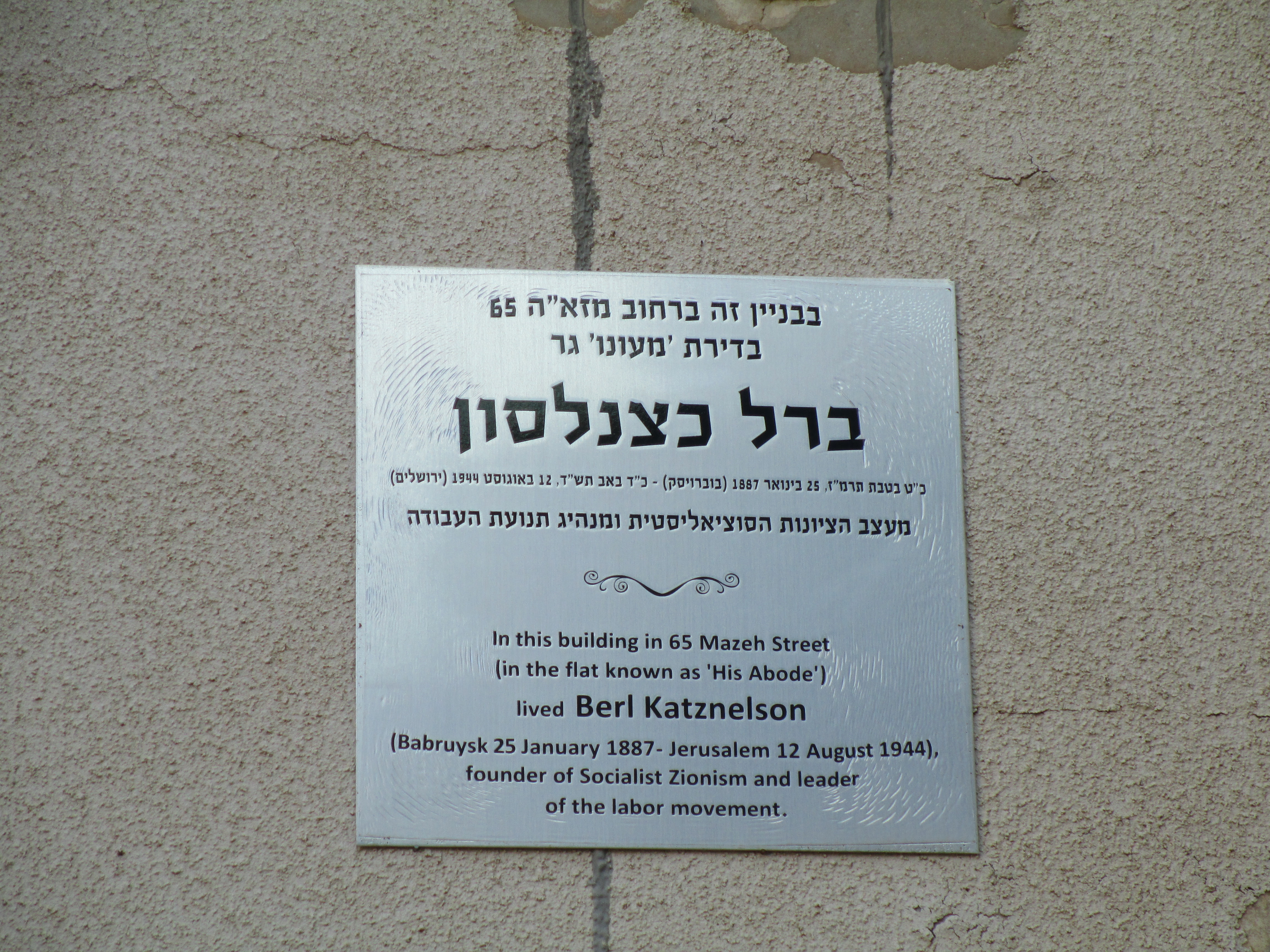 לוחית זיכרון לברל כצנלסון ברח' מאז"ה 65 בתל אביב